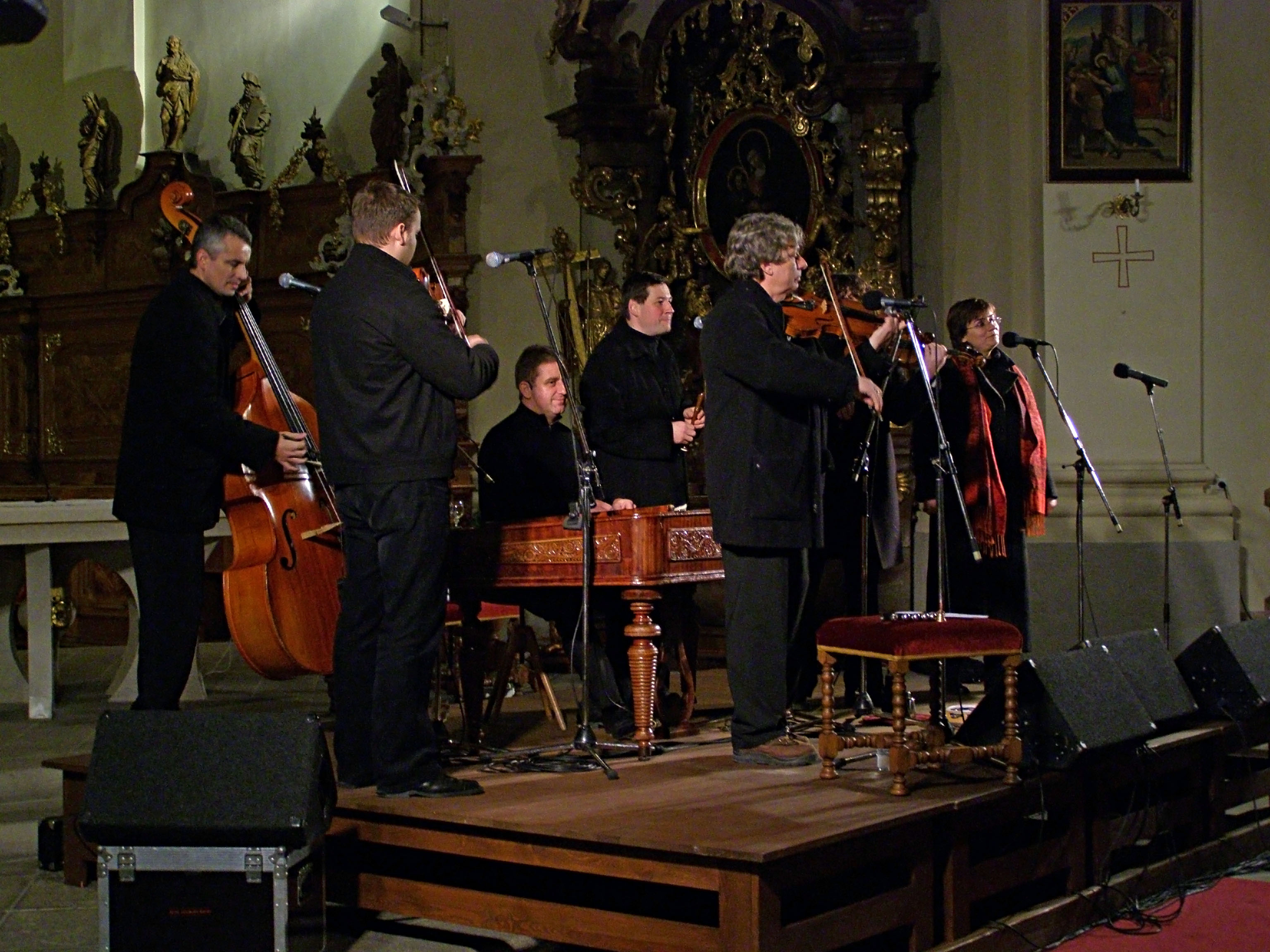 Hradišťan, vánoční koncert v Břevnovském klášteře